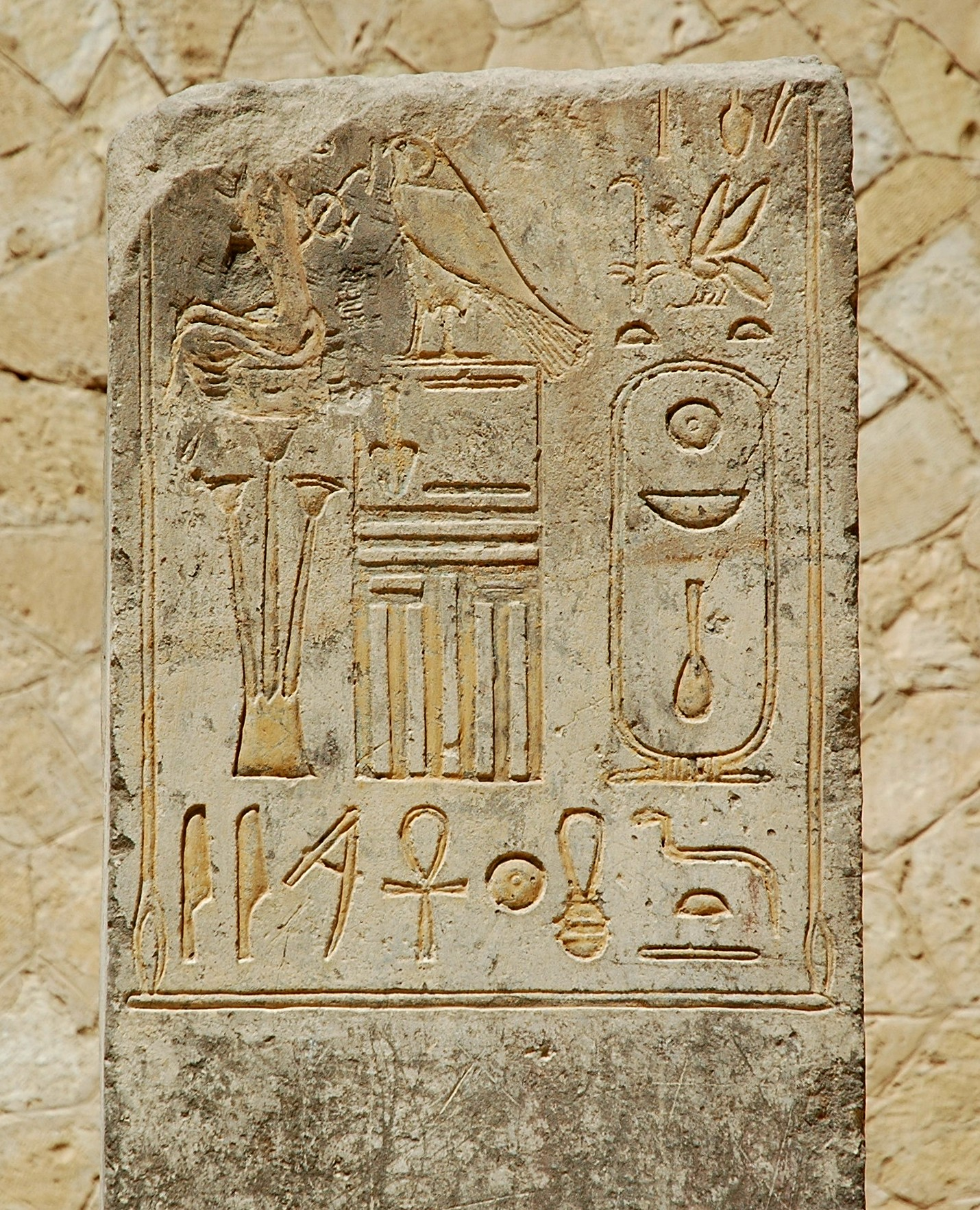 Pfeiler mit Relief aus der unteren Pfeilerhalle des Totentempel des Mentuhotep II. in Deir el-Bahari